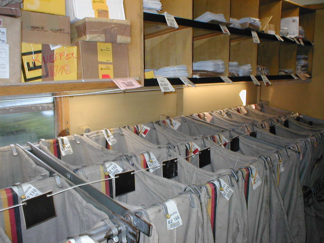 Aufgespannte Postbeutel im Inneren eines Bahnpostwagens der Deutschen Bundespost vor 1997 (Rekonstruktion während einer Jubiläumsfahrt September 2005)